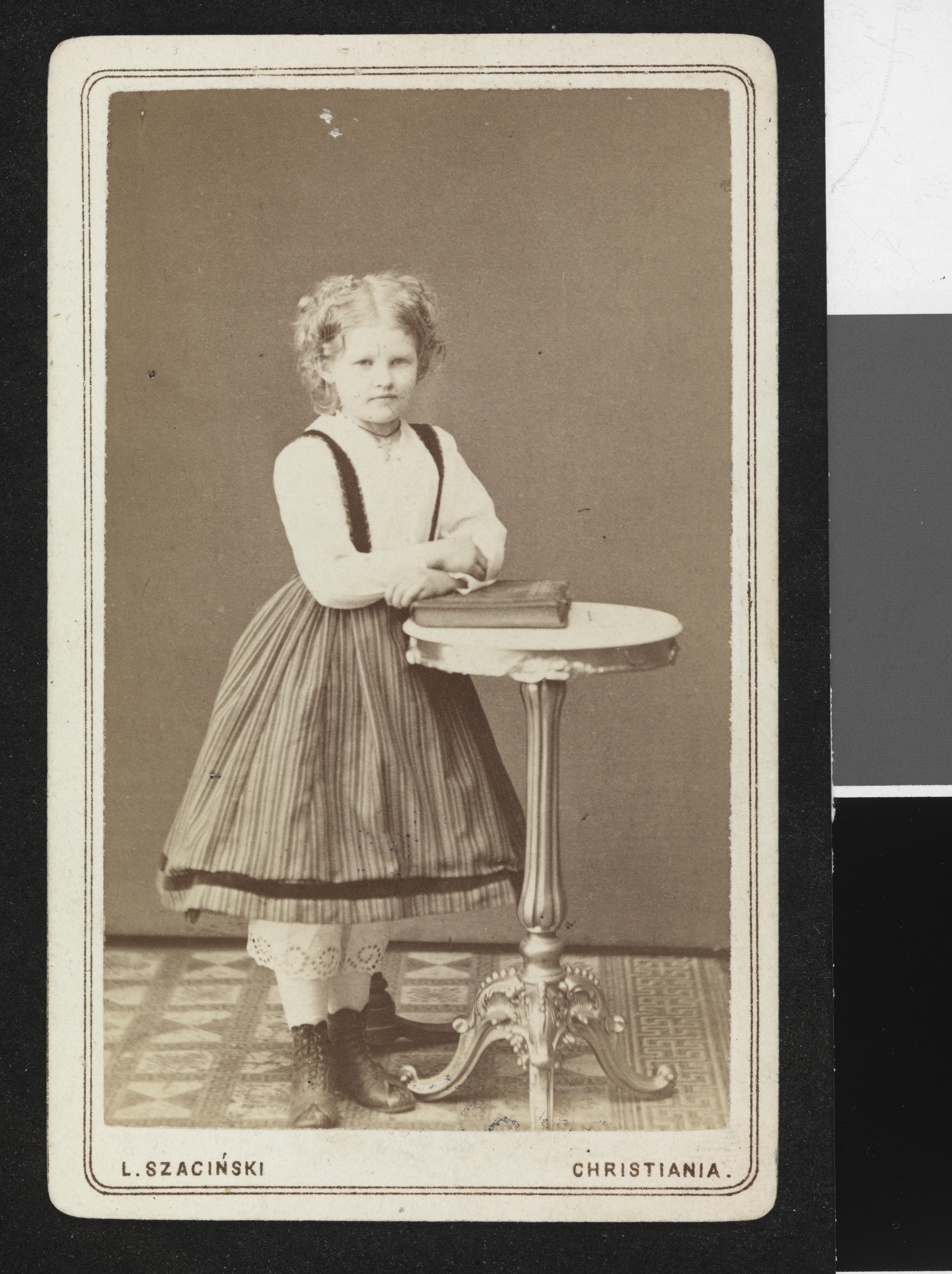 Bildet er hentet fra Nasjonalbibliotekets bildesamling